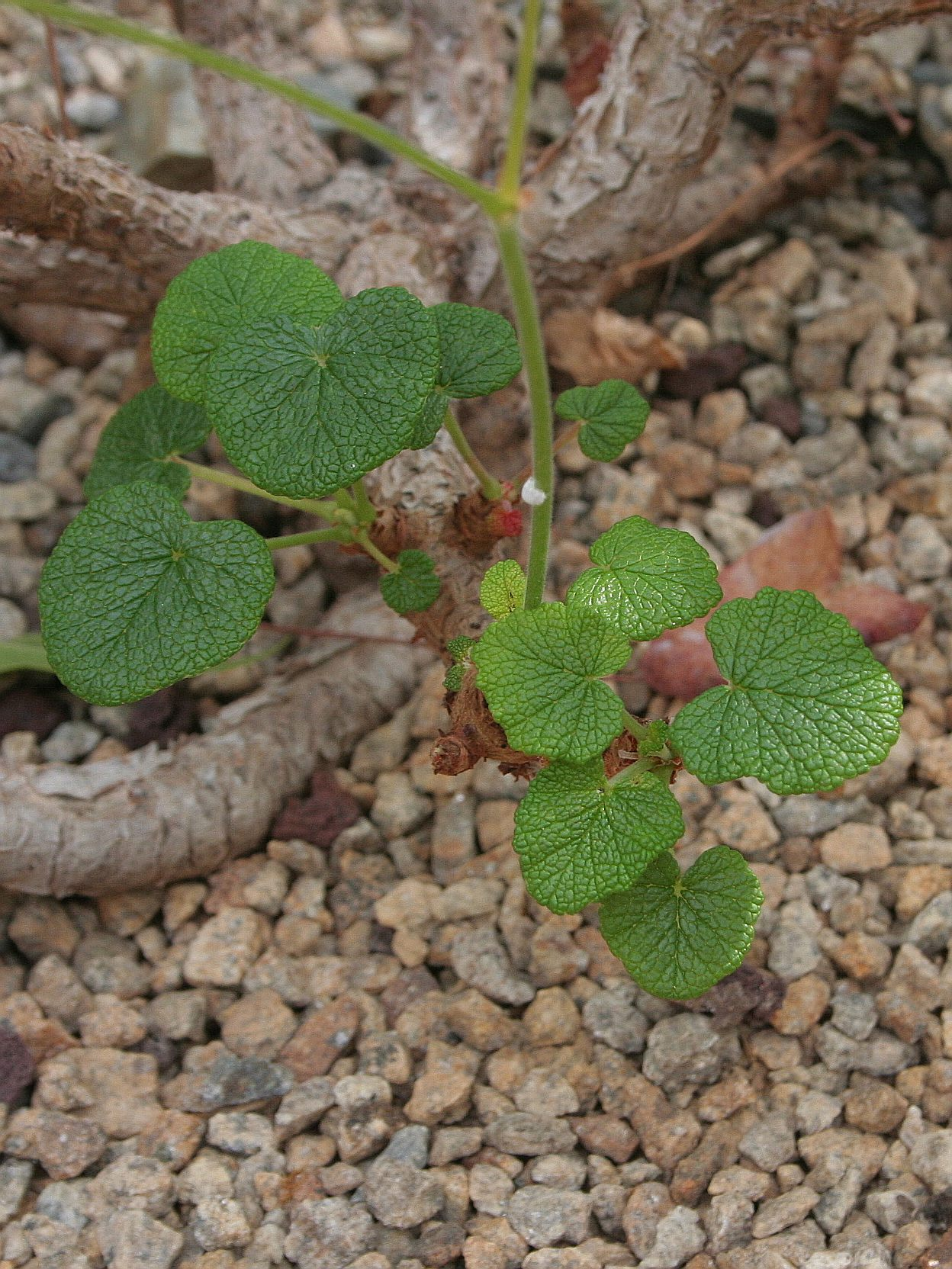 Pelargonium cotyledonis Conservatoire botanique national de Brest, juin 2007